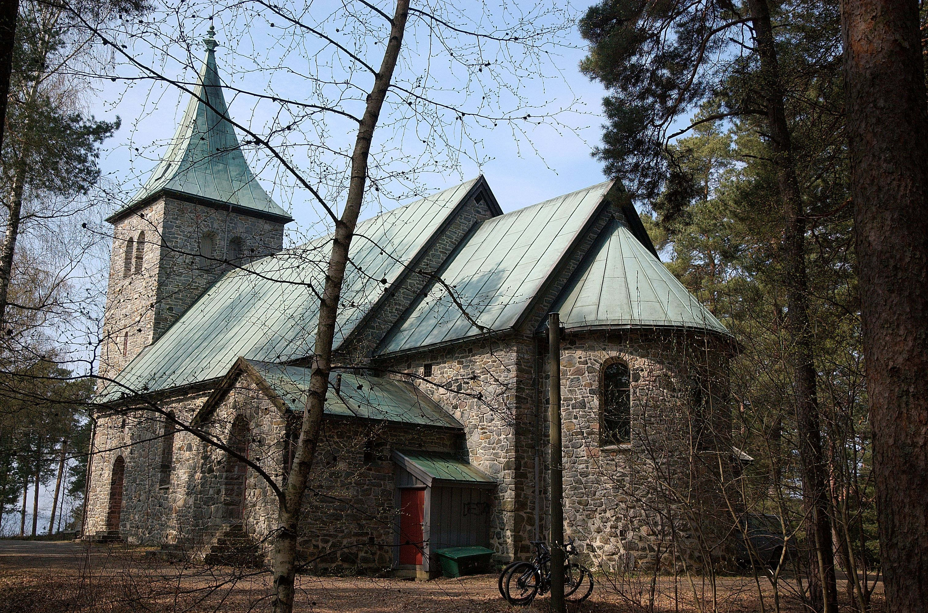 Ljan kirke fra 1932. Arkitekt Olav Olson